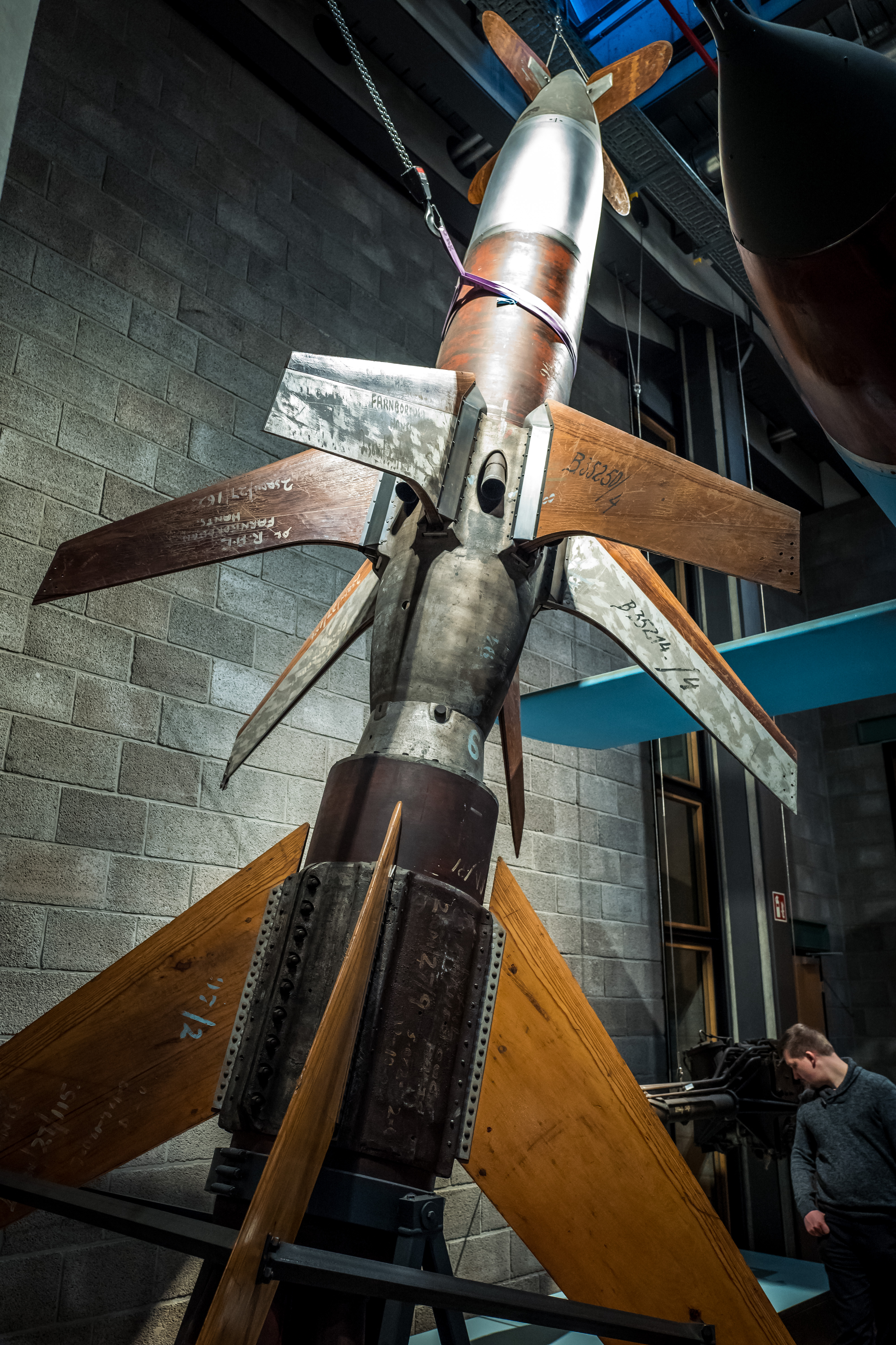 German Technology Museum, Berlin